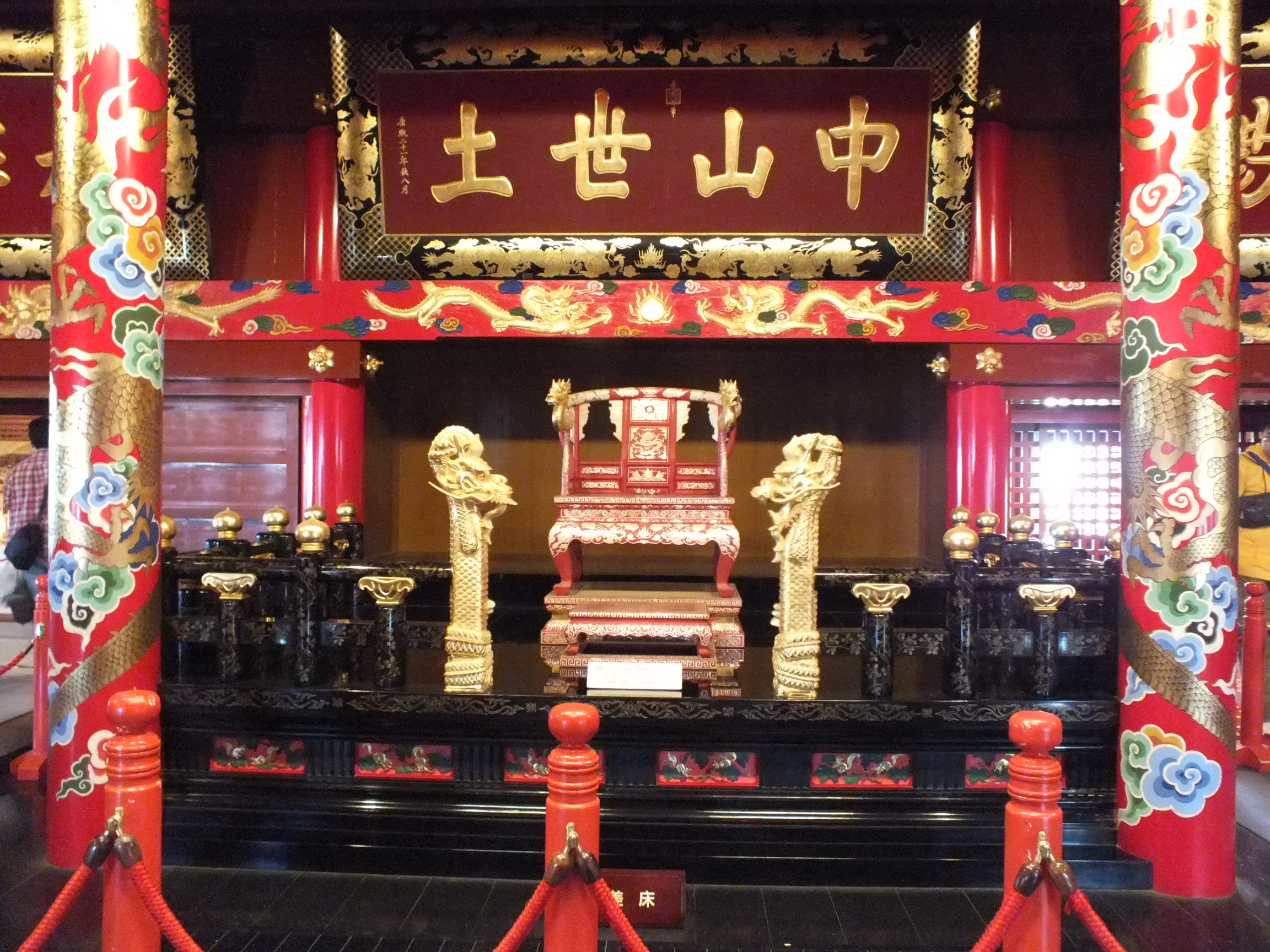 2014-02-28 Shuri Castle,Naha,Okinawa 首里城（沖縄県那覇市 ）